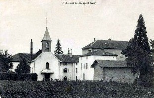 Carte postale ancienne de l'orphelinat Saint-Joseph à Beaupont (Ain). Orphelinat (de 1864 à 1964) - Institut médico-éducatif pour jeunes filles (de 1964 à 2002) - Foyer d'accueil médicalisé pour adultes handicapés (depuis 2002).